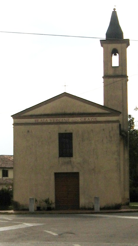 Mezzano Inferiore, chiesa del Borghetto